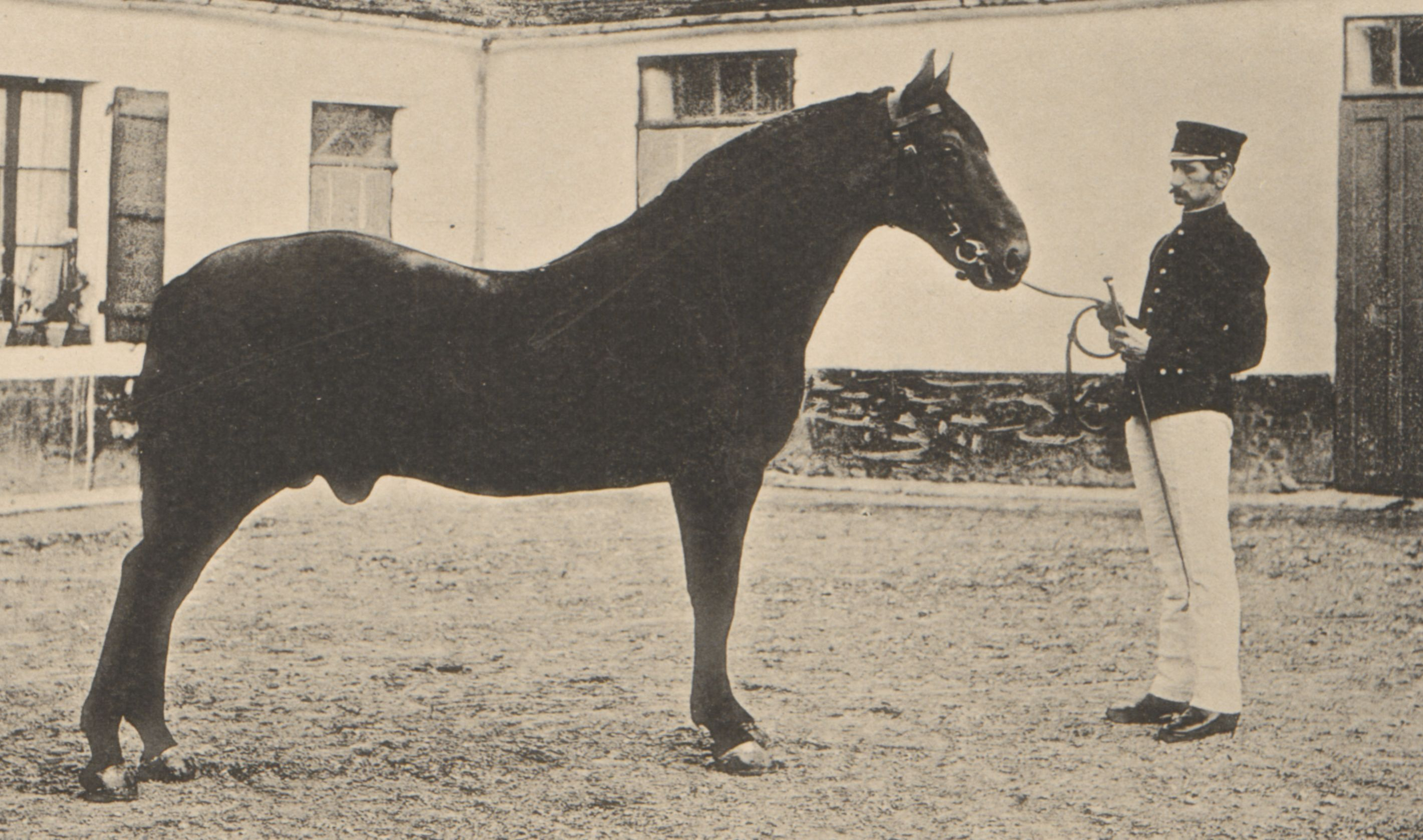 Niger, étalon trotteur (1869 - ) dans l'ouvrage de Gast Edmond